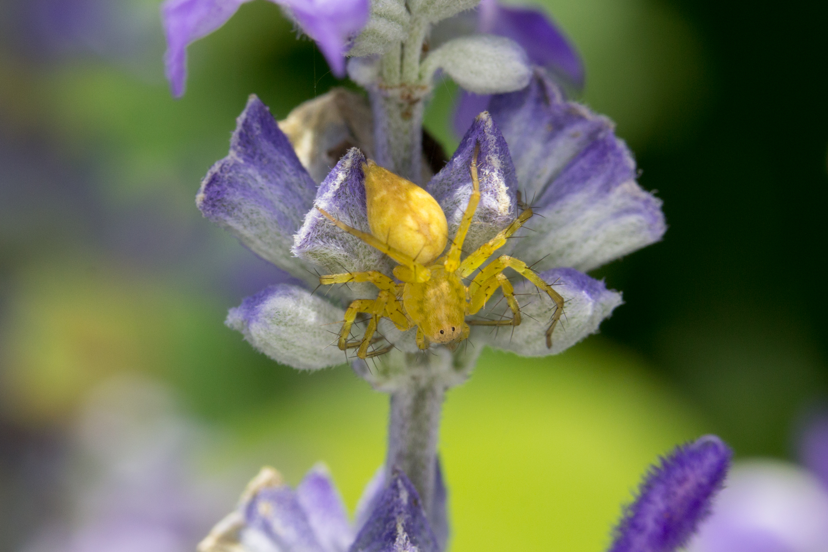 Variable Lynx Spider